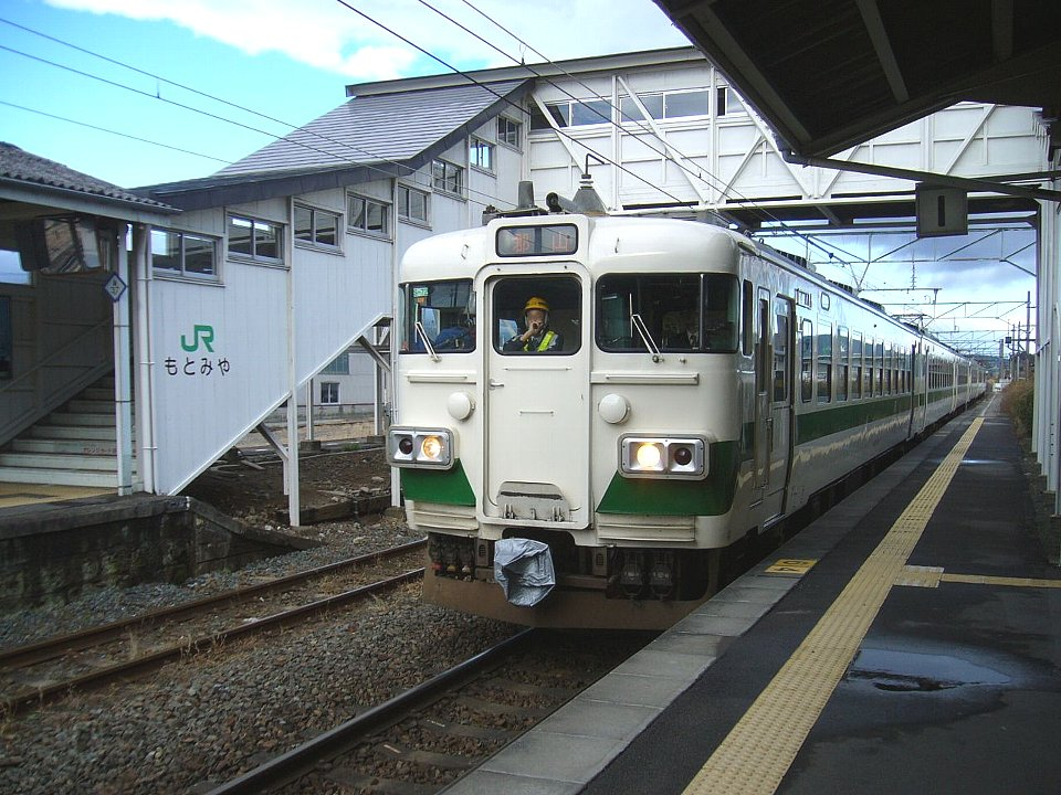 本宮駅へ進入する455系電車